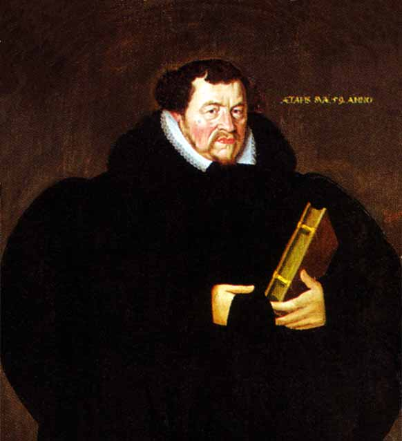 Gemälde Georg Mylius /Öl auf Holz